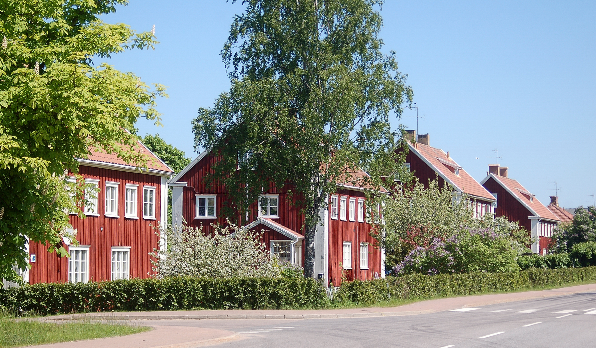 Bruksbostäder längs Bruksgatan i Skoghall, Sweden.